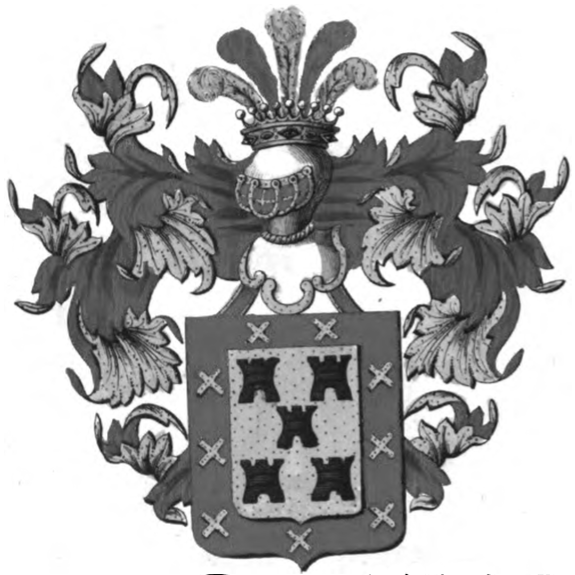 Armoiries de la famille de Peñaranda de Franchimont